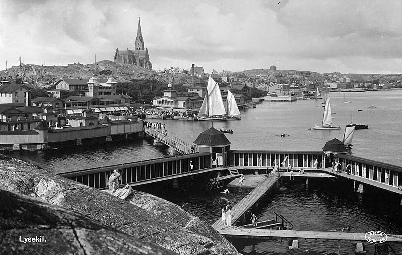 Motiv: Lysekil Nyckelord: Riksintressen Kategori: Kallbadhus, Kust- och skärgårdsmiljö Lysekil